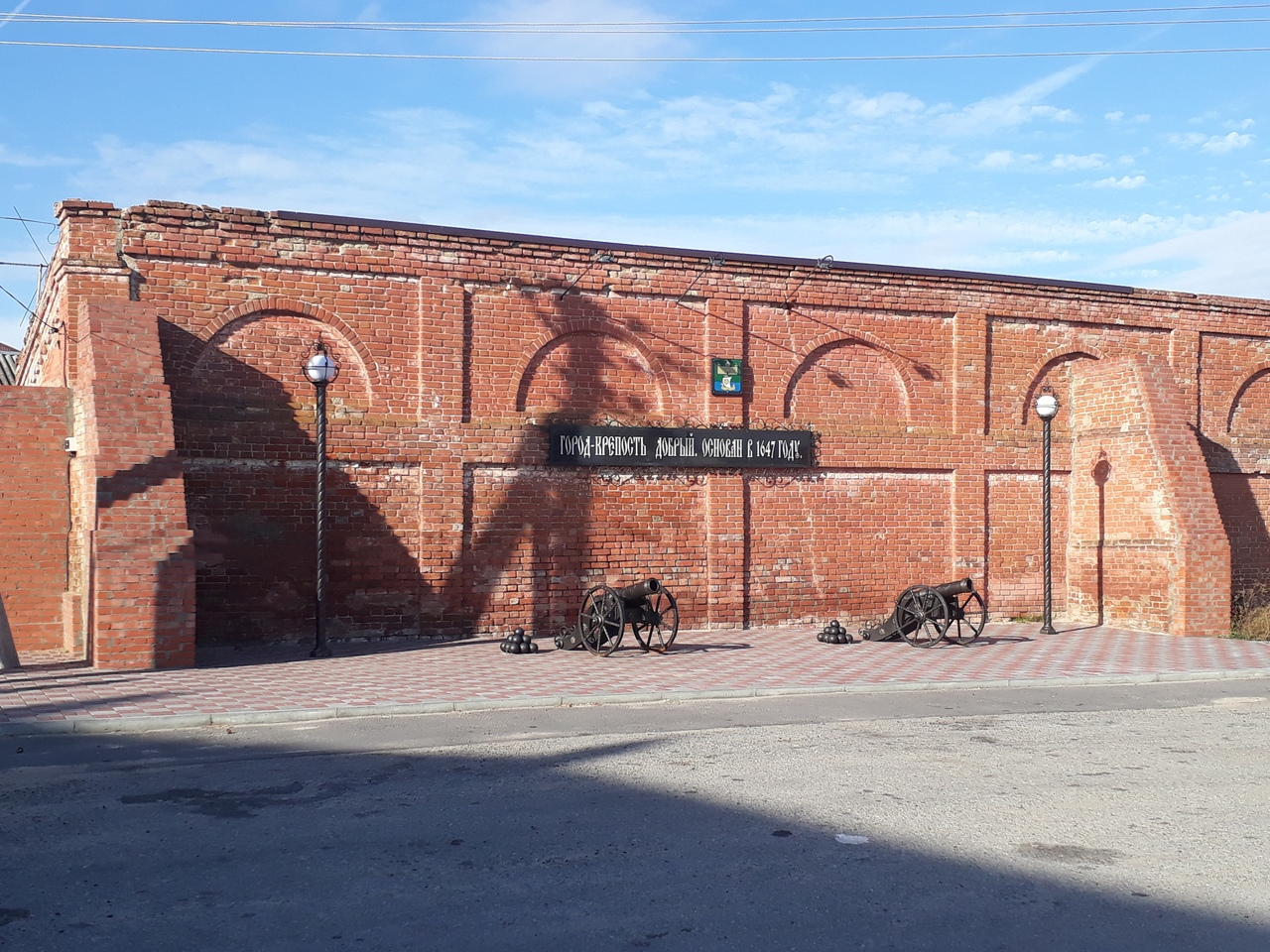 Усадьба графа Шатилова: Доброе, Добровский район, Липецкая область